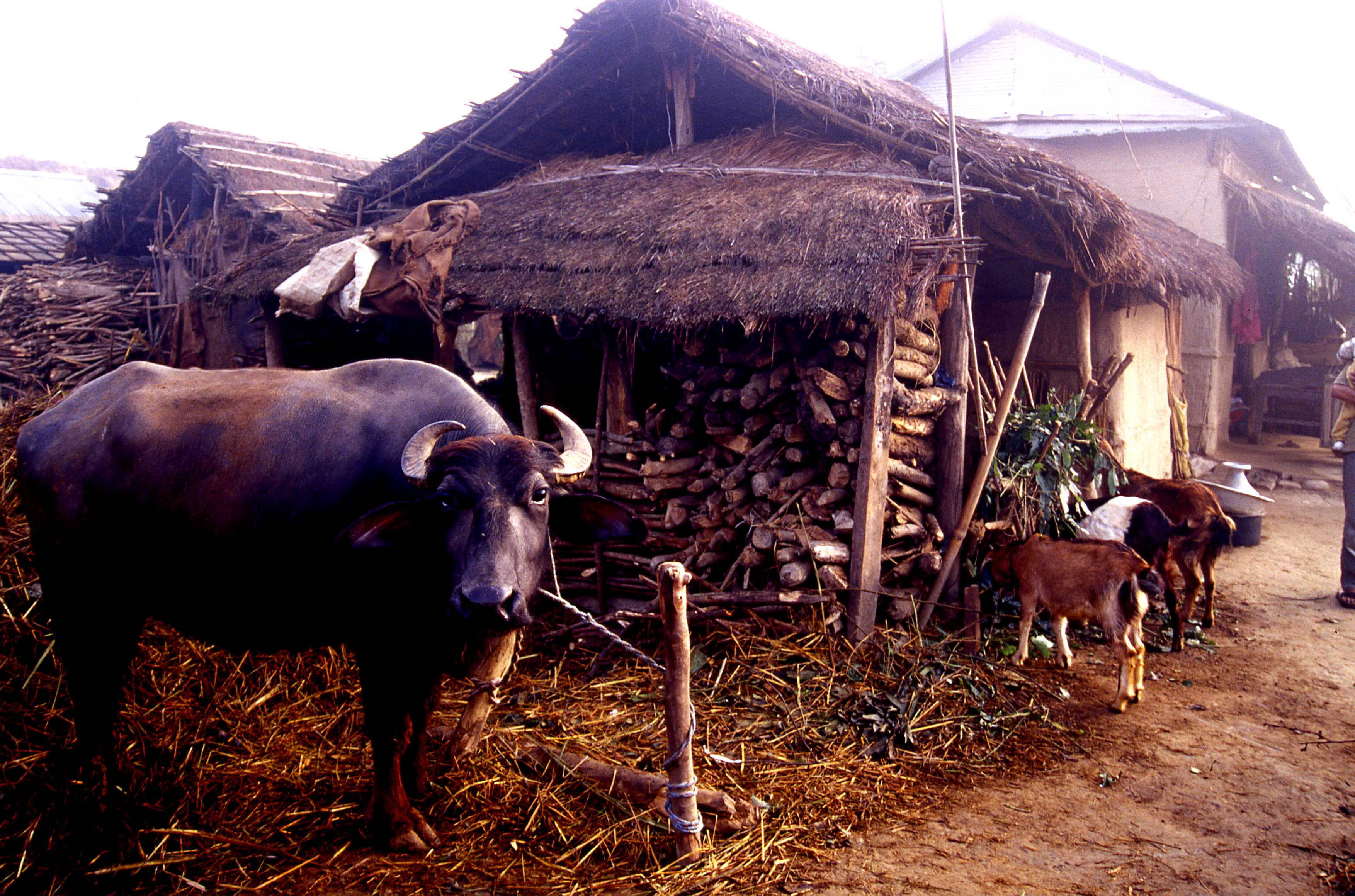 ロイヤル・チトワン国立公園近くのタルー族の村